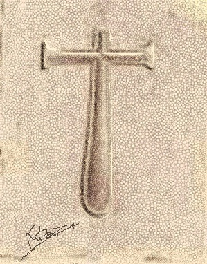 Cruz de la casa de Pansa, ruinas de Herculano. Hecha en paint a partir de una lámina de un libro.